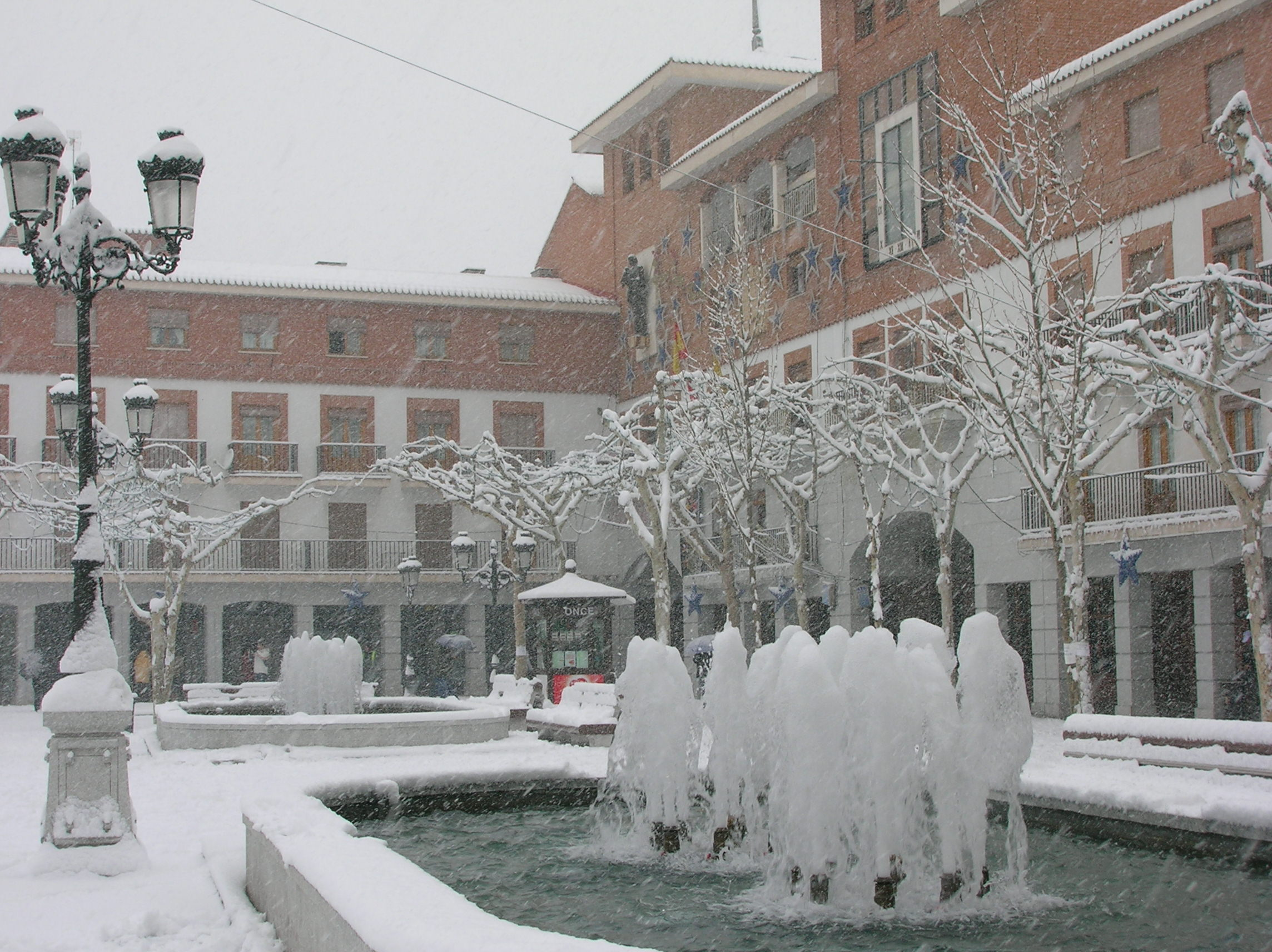 Plaza Mayor de Torrejón de Ardoz (Comunidad de Madrid, España) nevada.